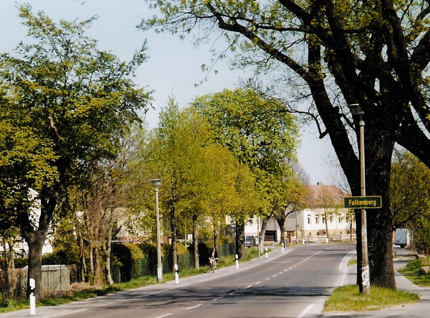 Berlin Falkenberg, Ortseingang Dorfstraße, vom Ortsteil Wartenberg aus.